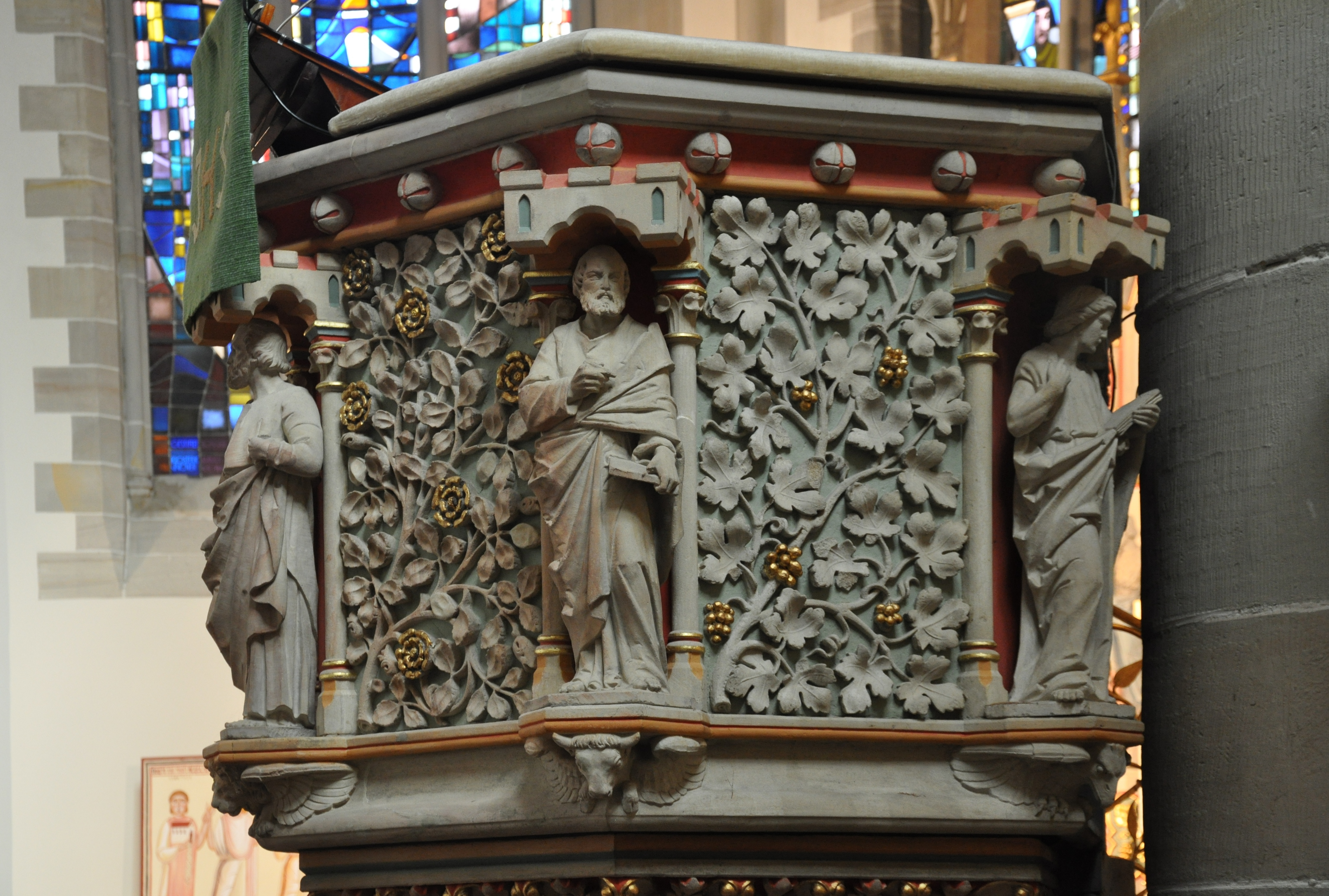 Hannover, Gartenkirche, Kanzel von Eberhard Hillebrand, 1890, mit Evangelistenfiguren der Fa. Maßler & Haller